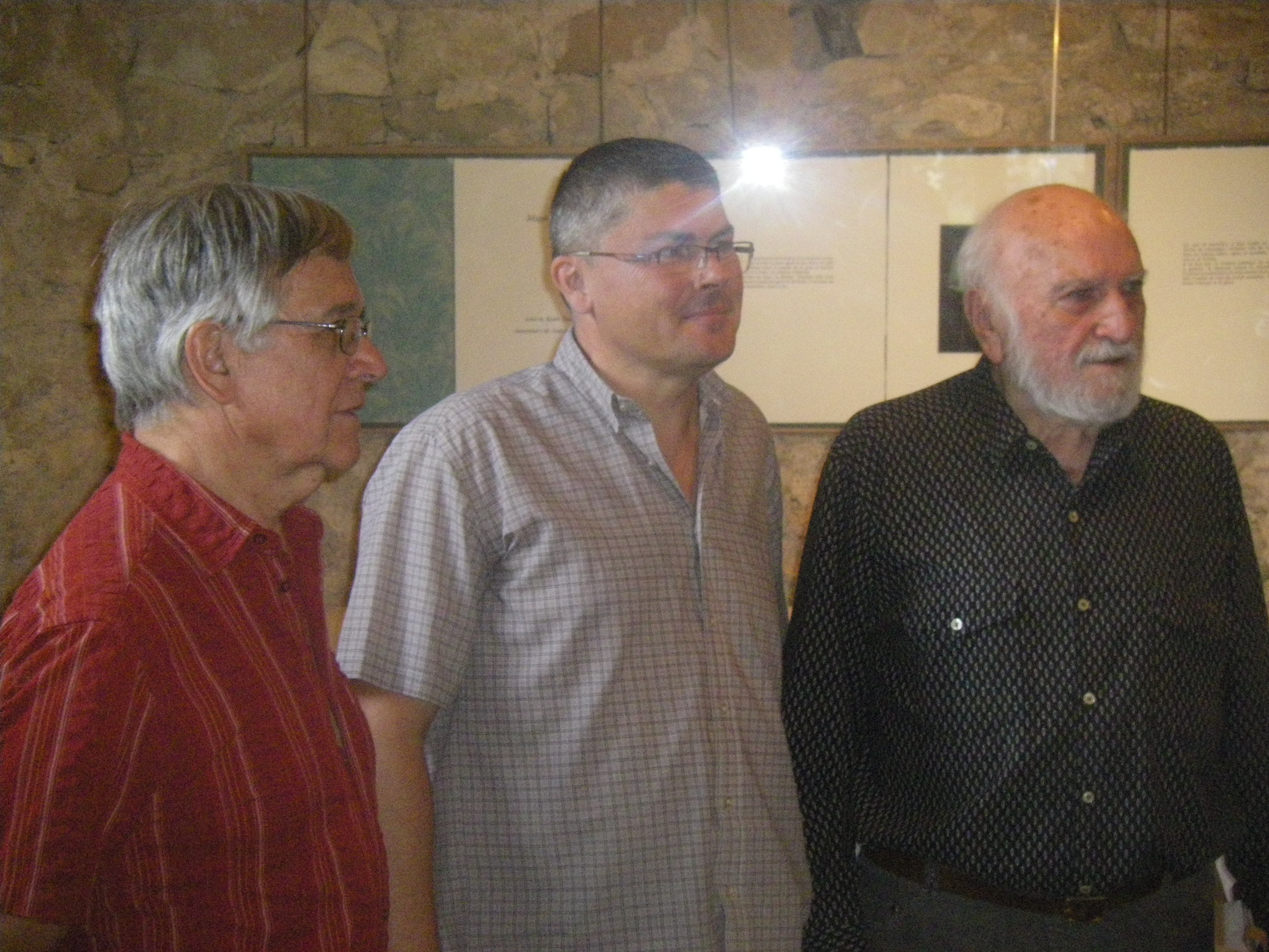 Stéphen Bertrand (centre) avec les poètes James Sacré et Frédéric Jacques Temple lors d'une lecture à Fondamente